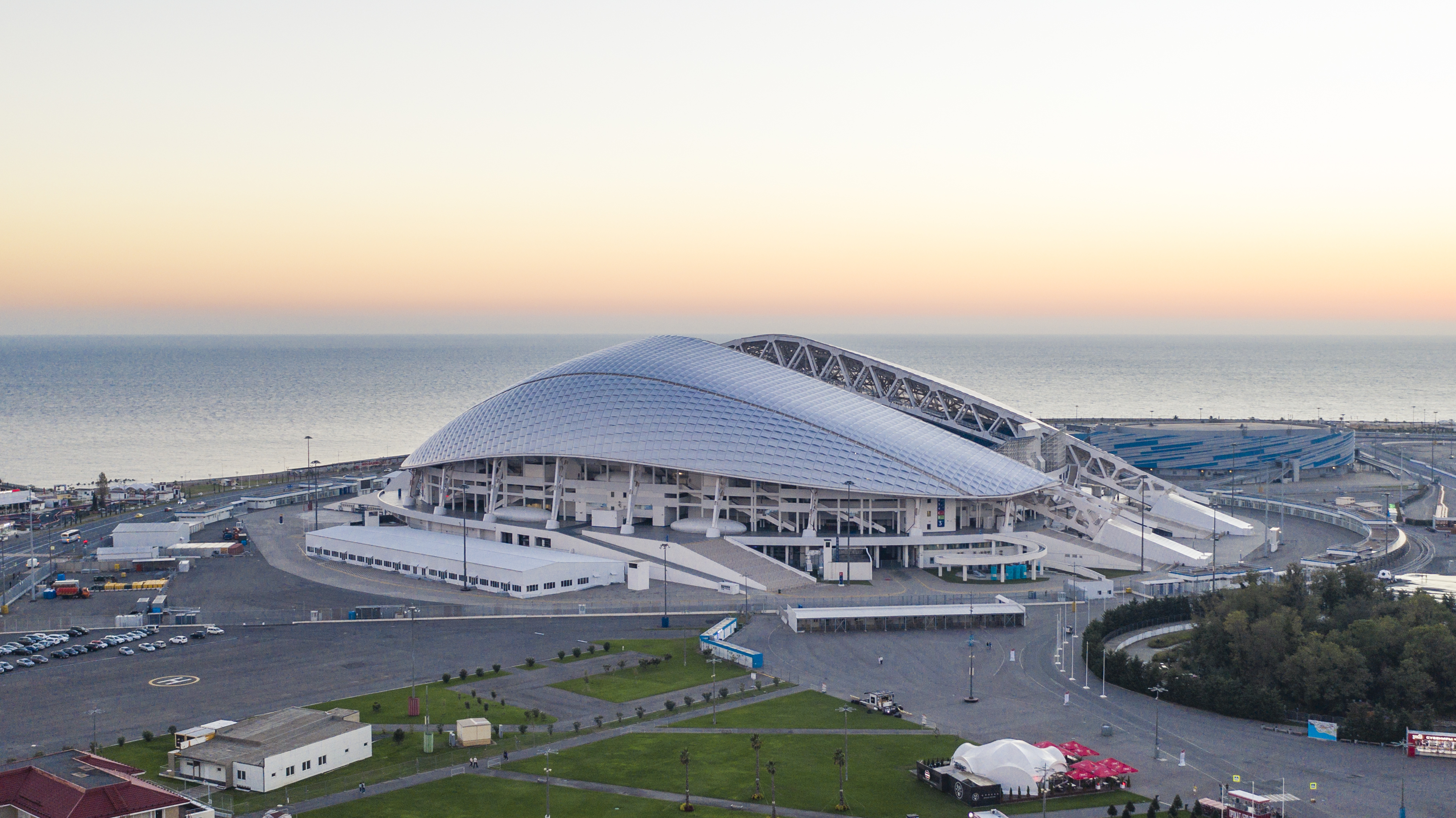 Blick auf das Olympiastadion von Sotschi